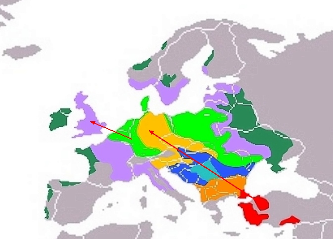 North-west migration of Streptopelia decaocto since 1900 until 1980 Source: Hölzinger/Mahler: Die Vögel Baden Württembergs. Bd 3 S. 59